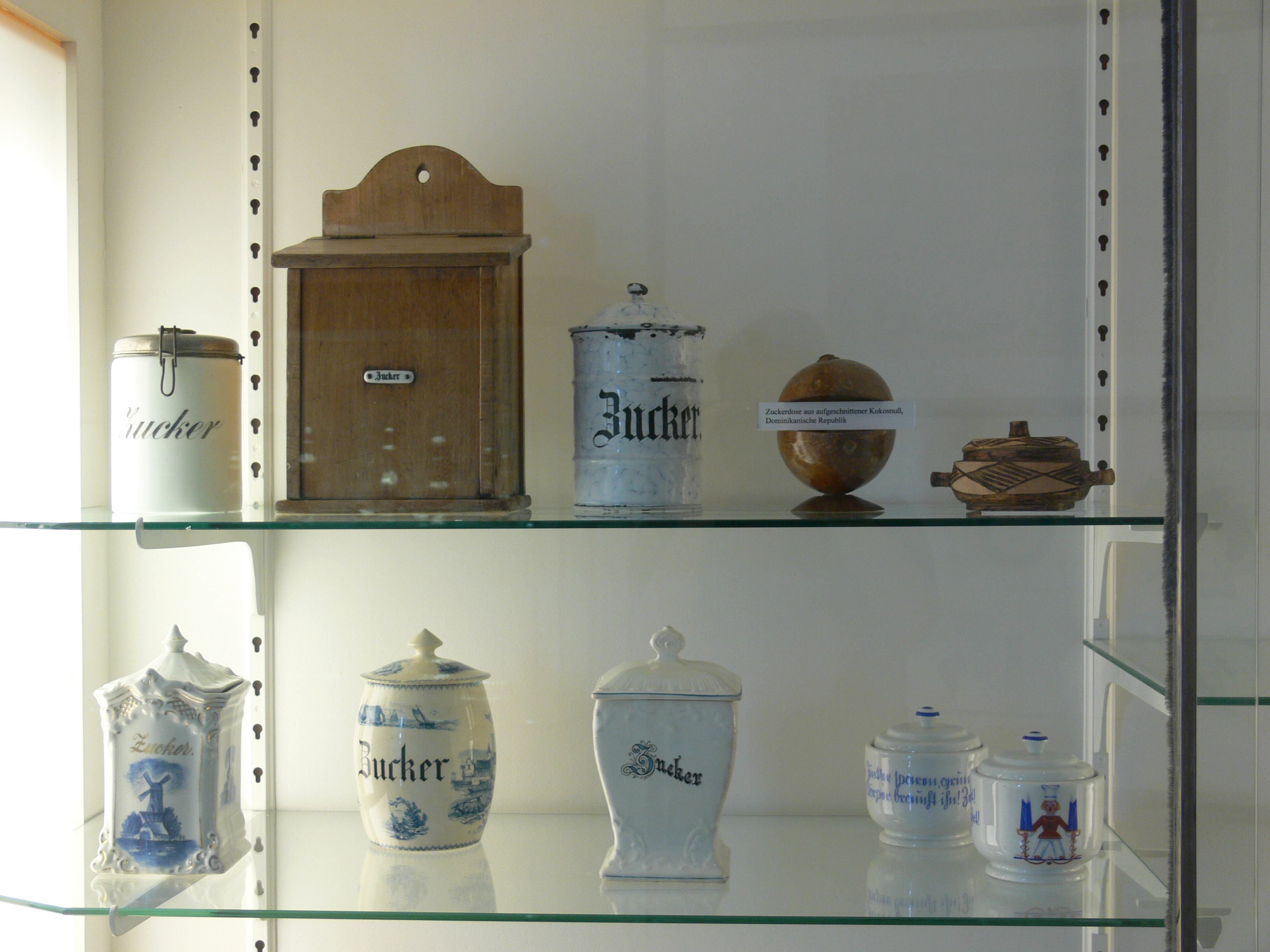 Zuckerdosen; Zucker-Museum Berlin